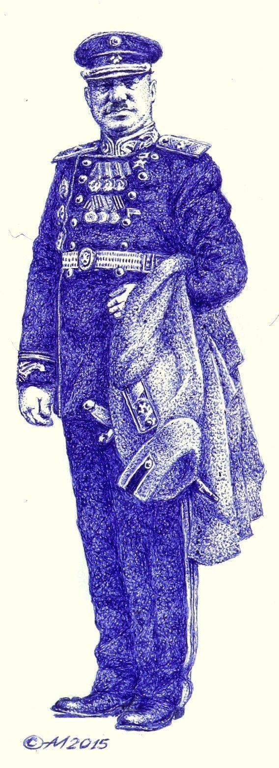 Вице-генерал-директор 1 ранга, заместиель МПС СССР Б.Н.Арутюнов в парадной форме (летнем офицерском пальто) Вторая пол. 40-х - 1954. (Эскиз)